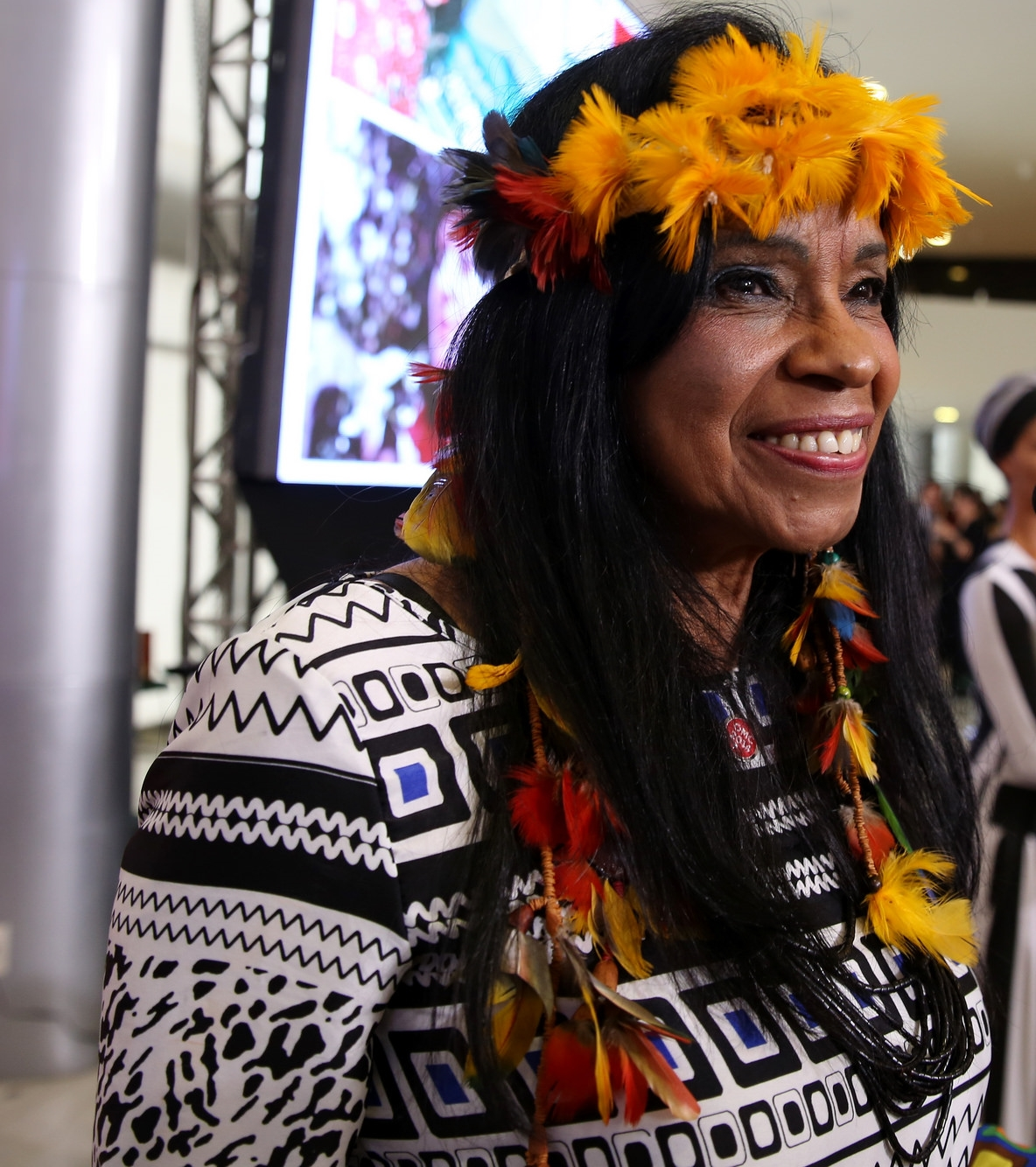 Eliane Lima dos Santos Potiguara (Rio de Janeiro, 29 de setembro de 1950 -) é uma professora e escritora indígena brasileira, remanescente dos potiguaras. É Conselheira do Instituto Indígena de Propriedade Intelectual e Coordenadora da Rede de Escritores Indígenas na Internet, além de integrante da Rede Grumin de Mulheres Indígenas. Foi uma das 52 brasileiras indicadas para o projeto internacional "Mil Mulheres para o Prêmio Nobel da Paz".